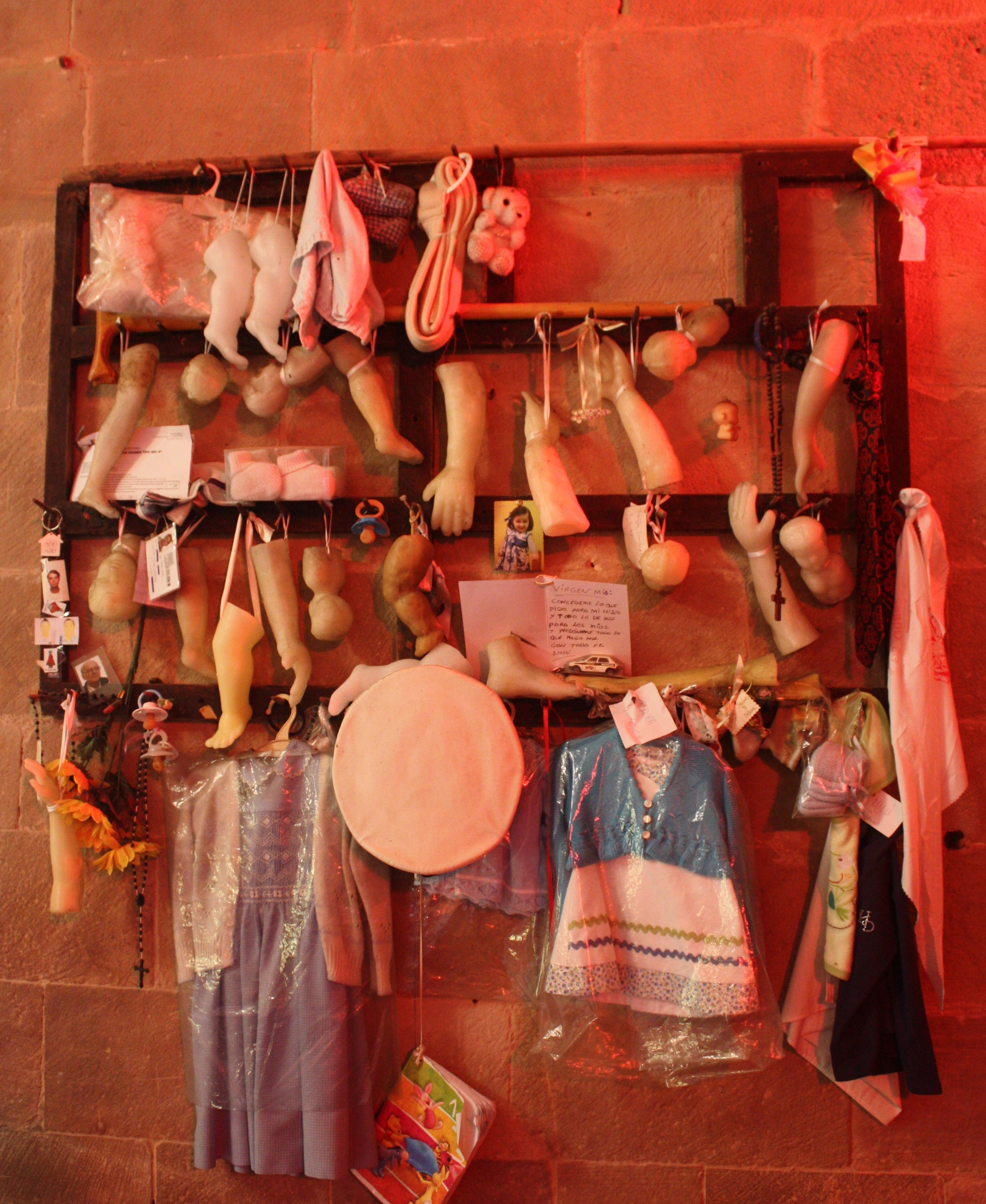 Santuario de Lugás. Villaviciosa. Asturias